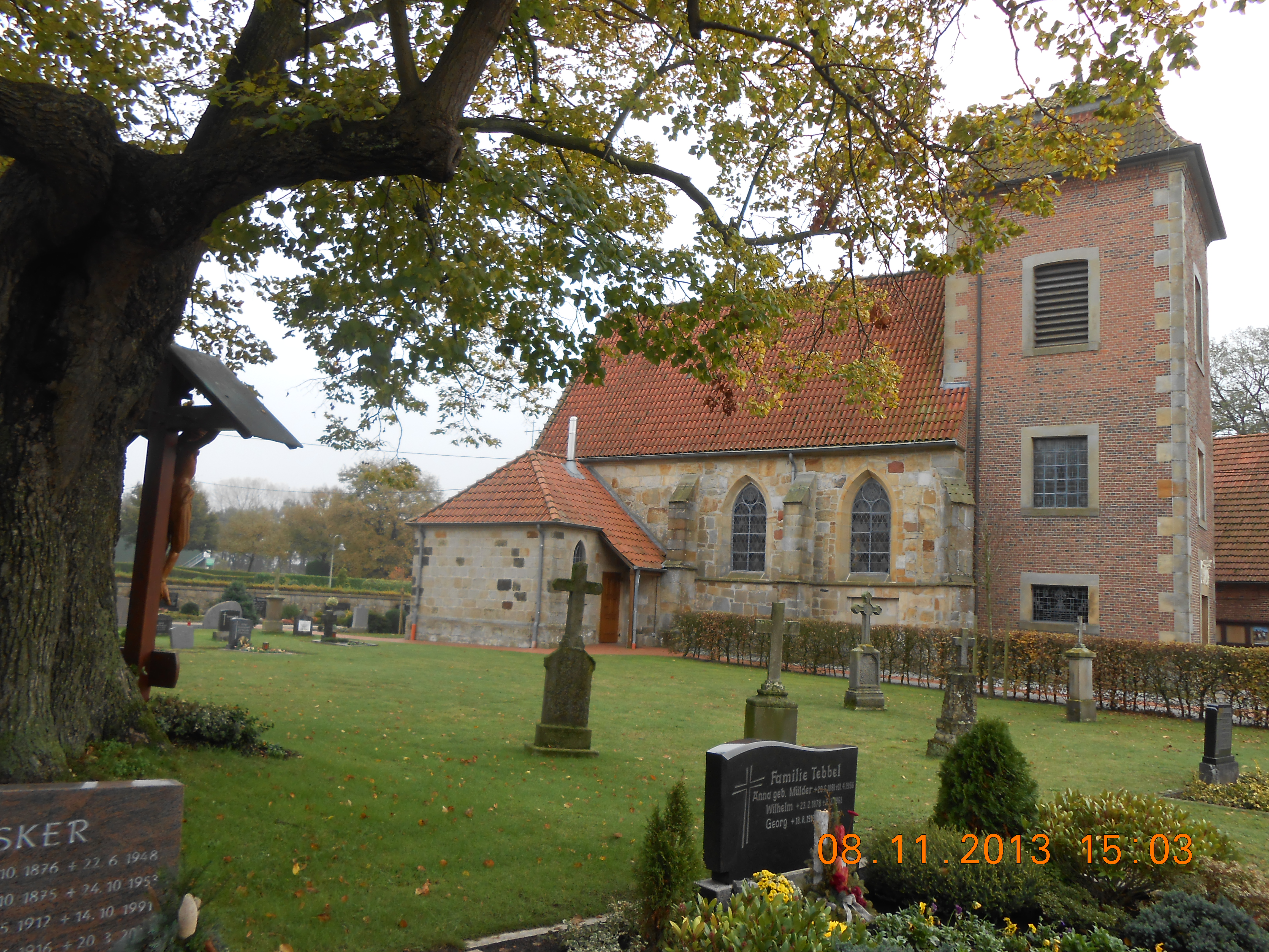 La katolikaj preĝejo kaj la tombejo de Elbergen, en la komunumo de Emsbüren, Germanio.